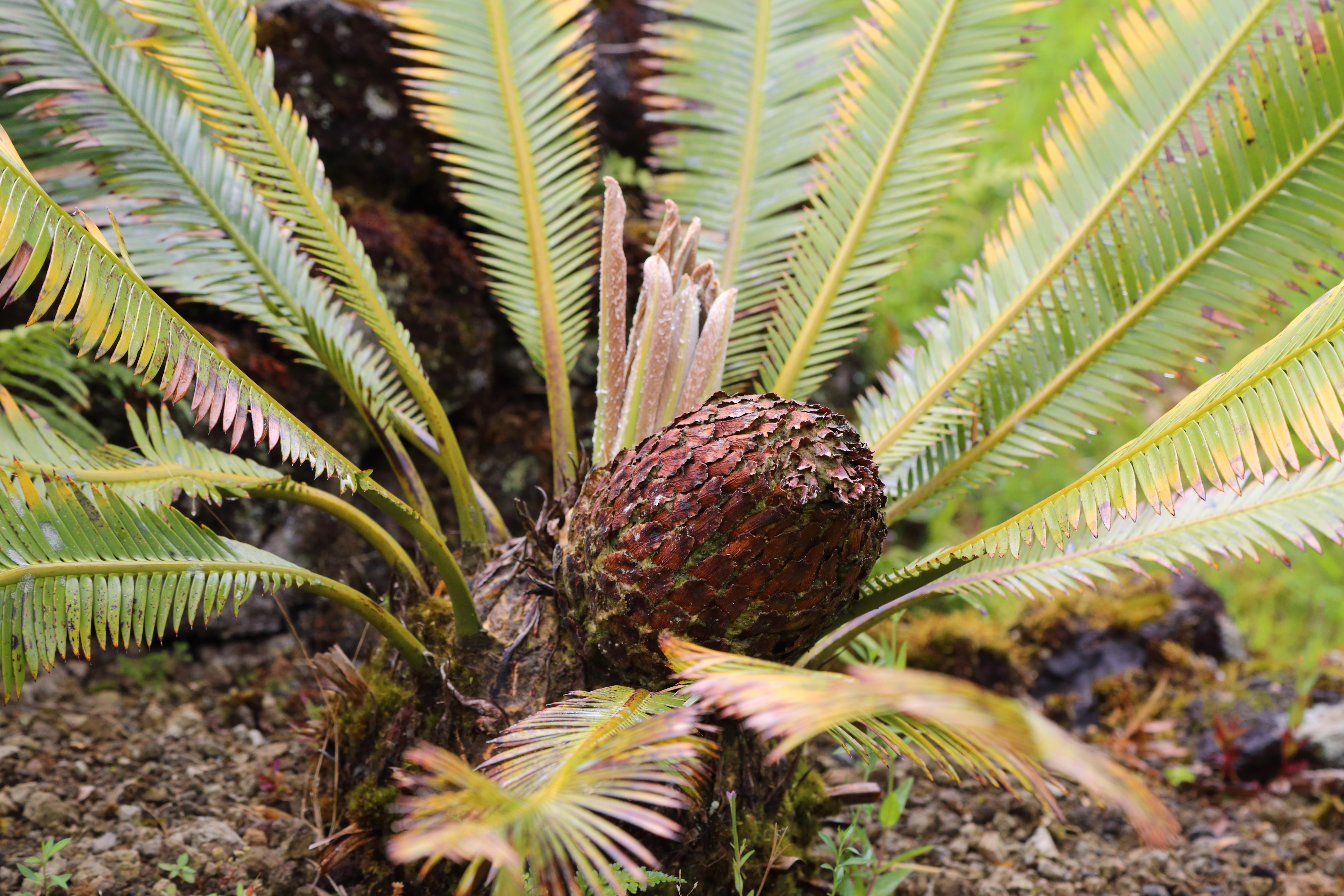 Dioon edule i parken Terra Nostra, Furnas, Azorerna.